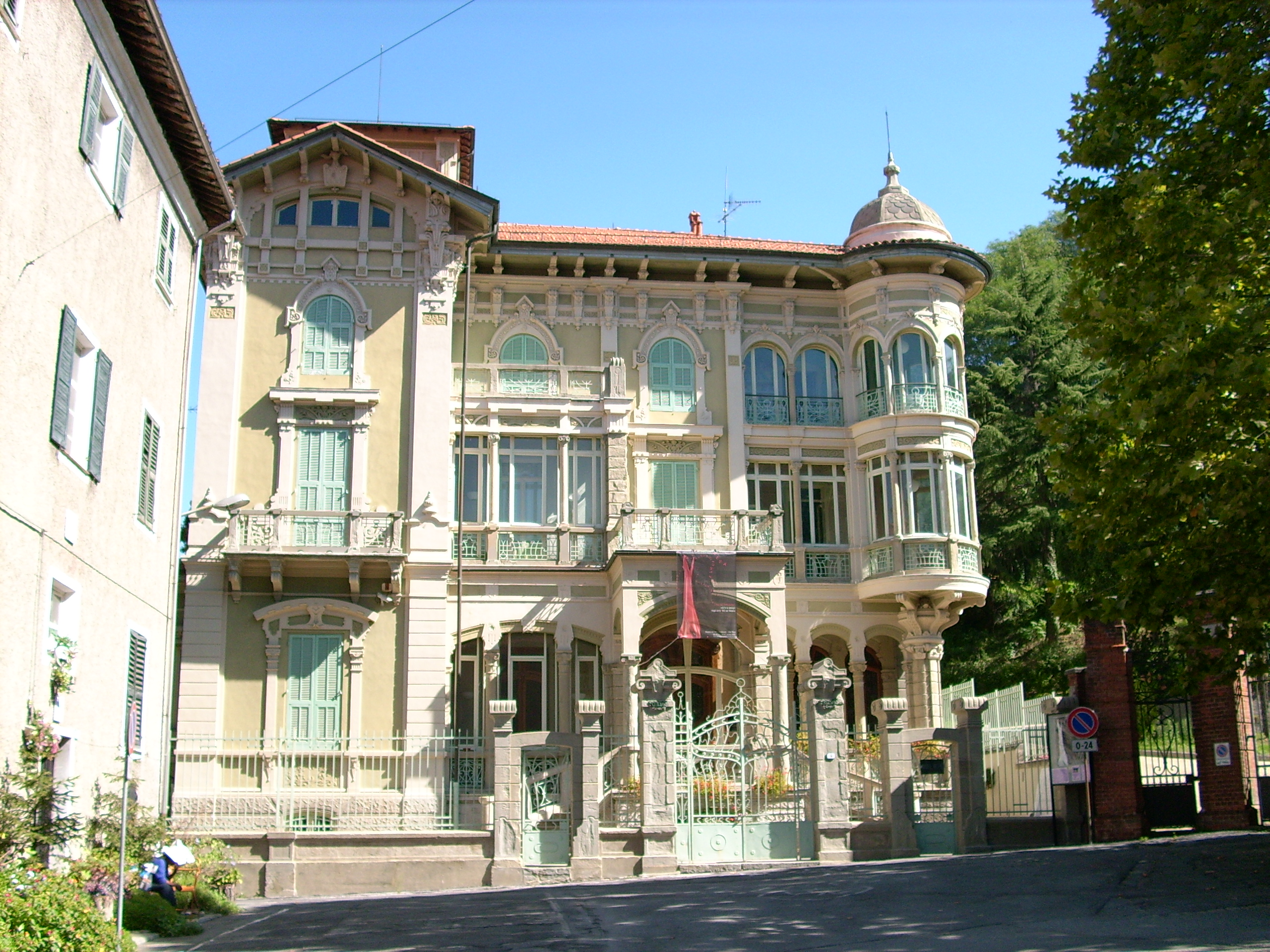 Museo del vetro di Altare, Liguria, Italia